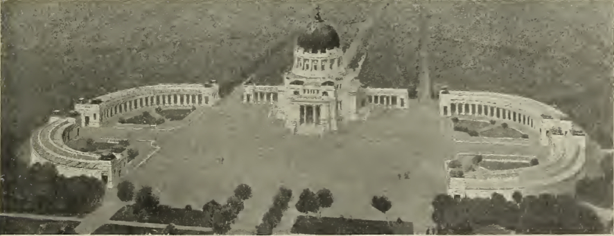 Wien - Friedhof. Details siehe Dateiname.